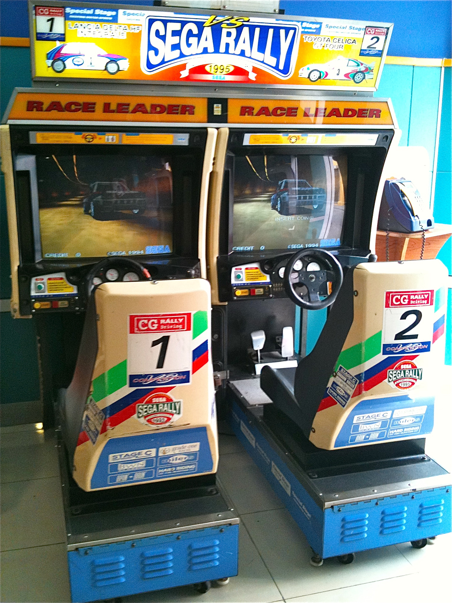 Arcade Automat des Spiels Sega Ralley 1995